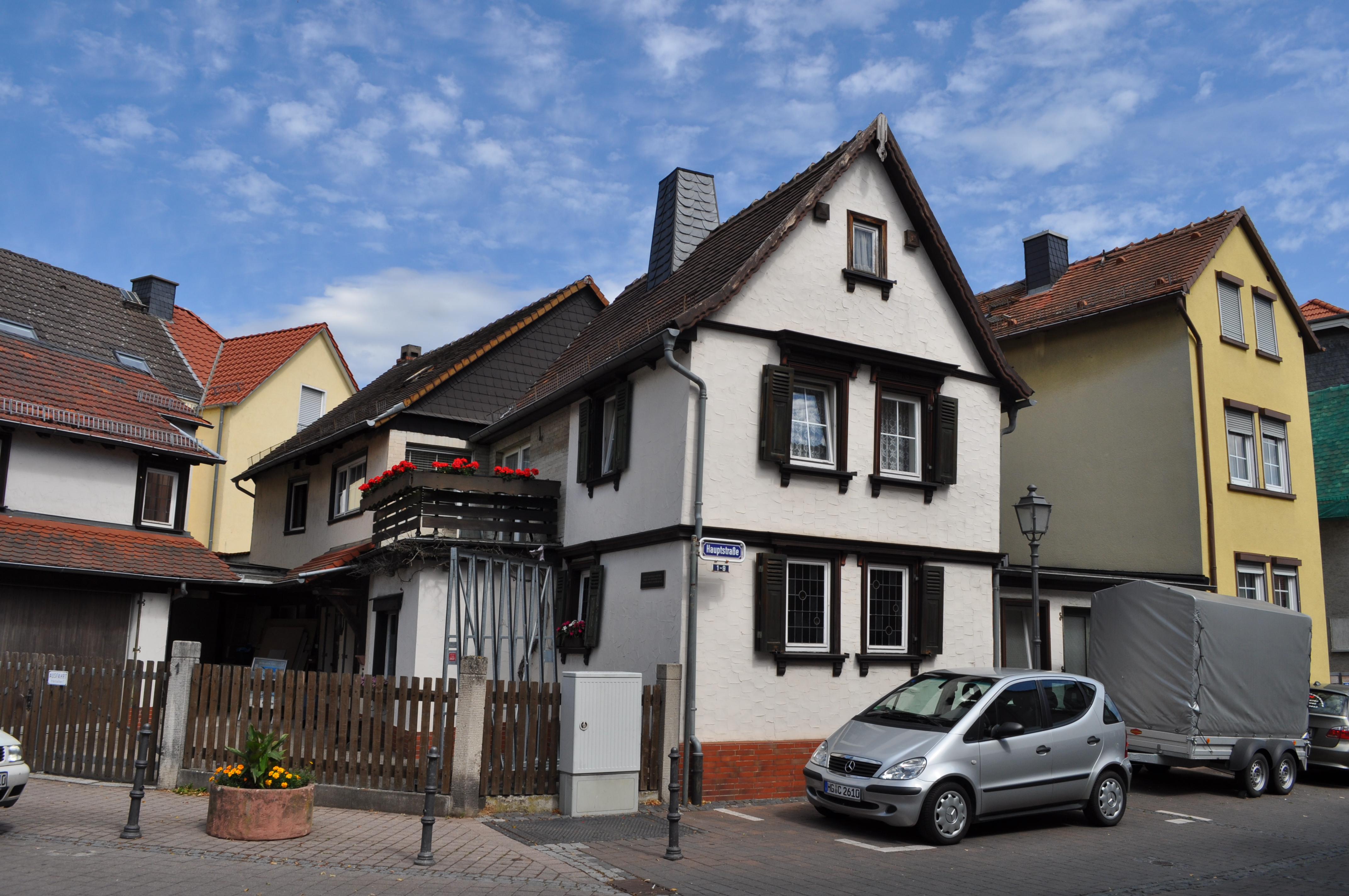 Das älteste Haus in Kirdorf, erbaut 1611. Dieses Haus überstand als einziges den Brand von 1622.